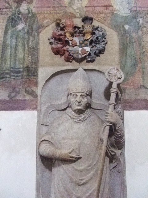 Stiftsbasilika St. Vitus, Ellwangen (Jagst)Grabmal des Fürstpropsts Christoph von Freiberg († 1584)